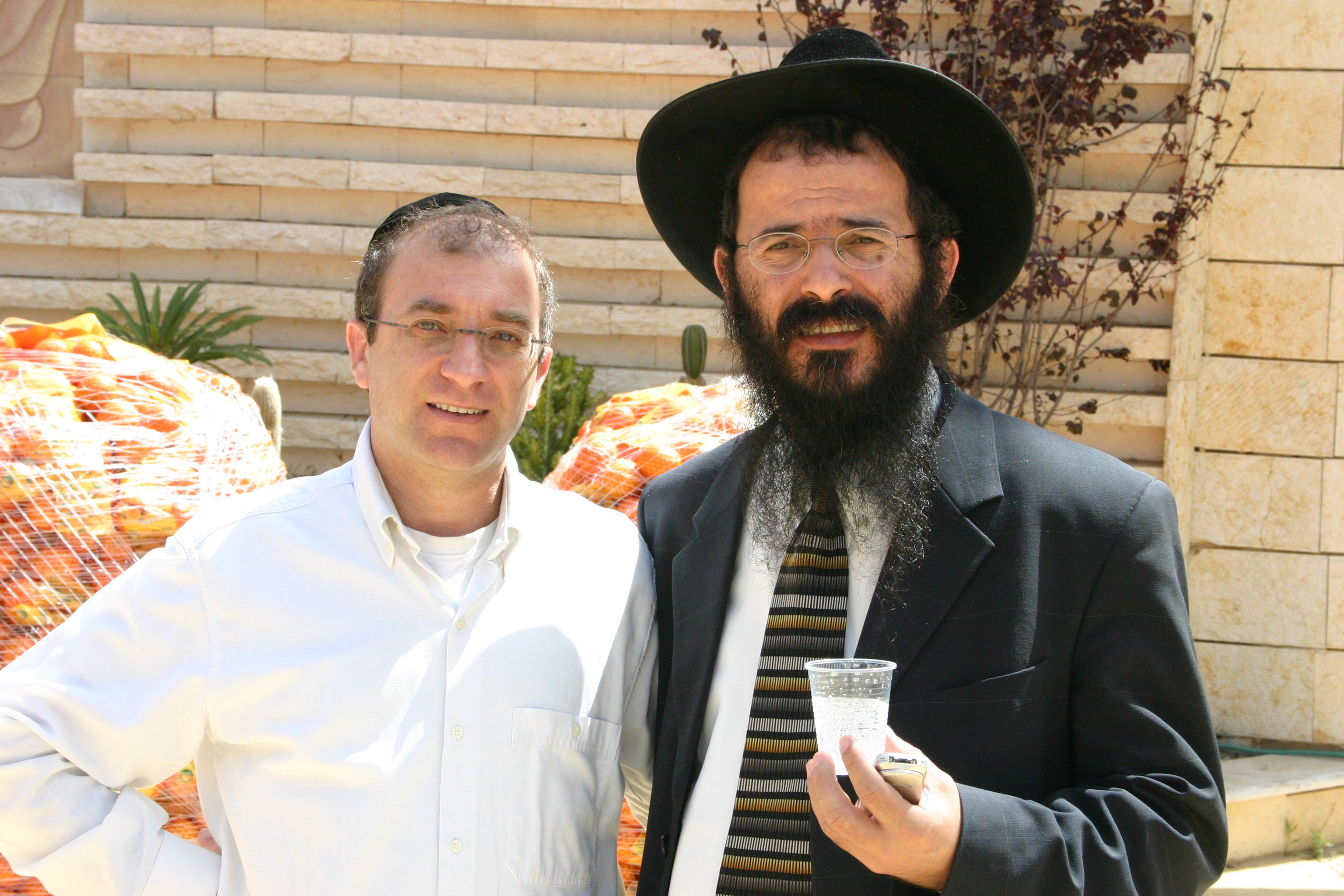 הרב נתן בוקובזה ז"ל עם מאיר שפיגלר, בחלוקת אלפי מנות מזון לחג הפסח של הרב ז"ל. אולמי "גן עדן" בנתיבות, ח' ניסן ה'תשס"ה